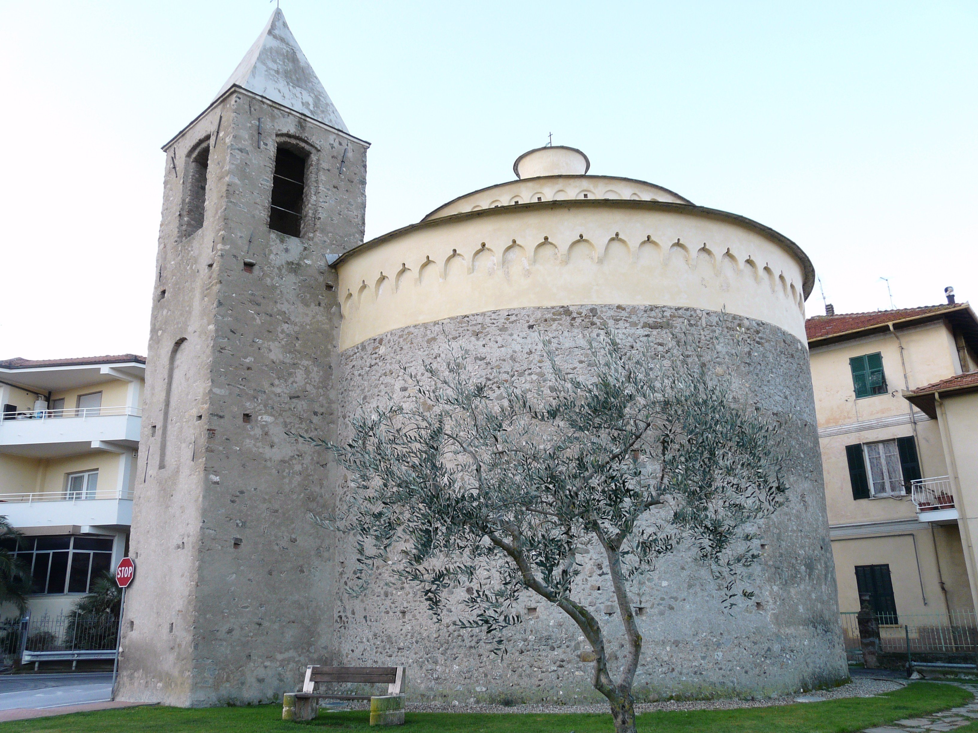 Chiesa di Santa Maria del Soccorso (detta "La Rotonda"), Villanova d'Albenga, Liguria, Italia